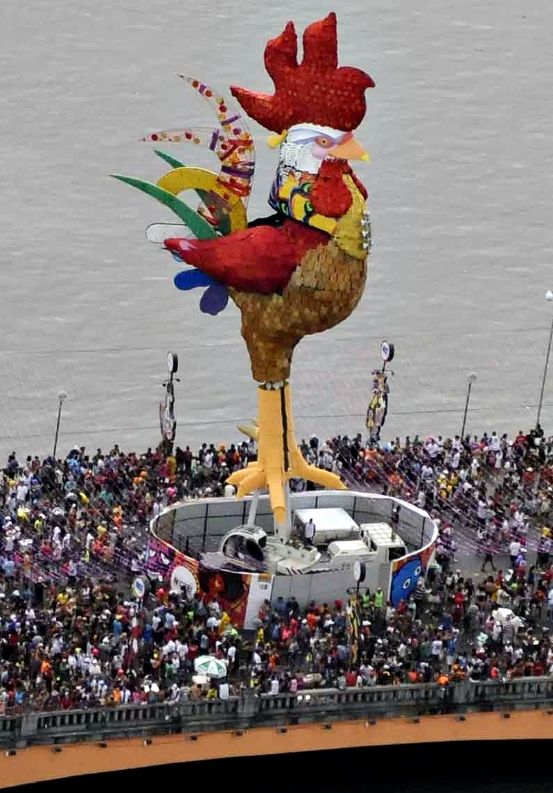 Bloco carnavalesco Galo da Madrugada - Recife, Pernambuco, Brasil